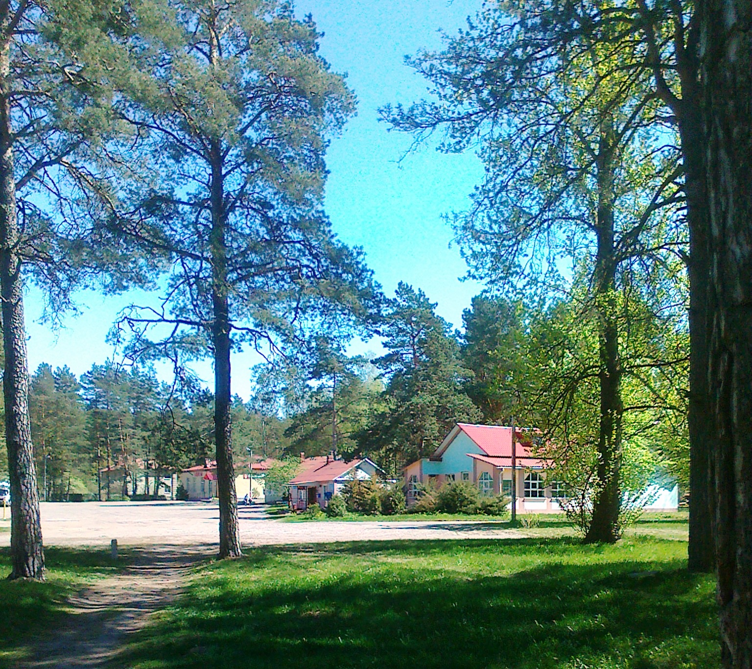 Агрогородок Горбацевичи, Бобруйский район